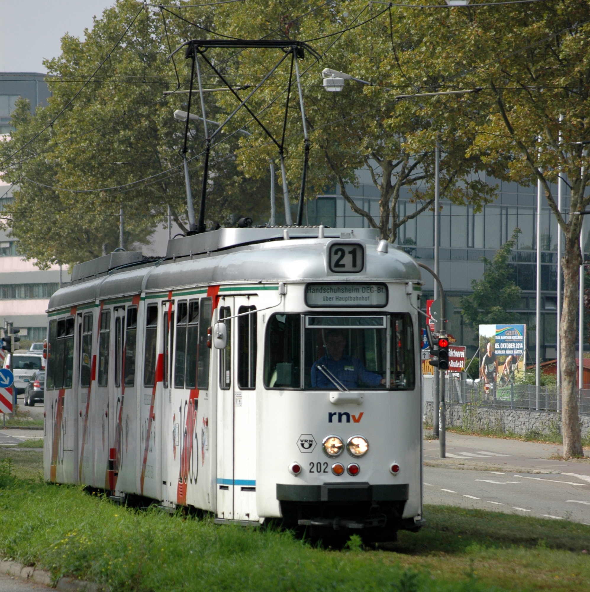 Heidelberg: DÜWAG GT8ZR RNV 202